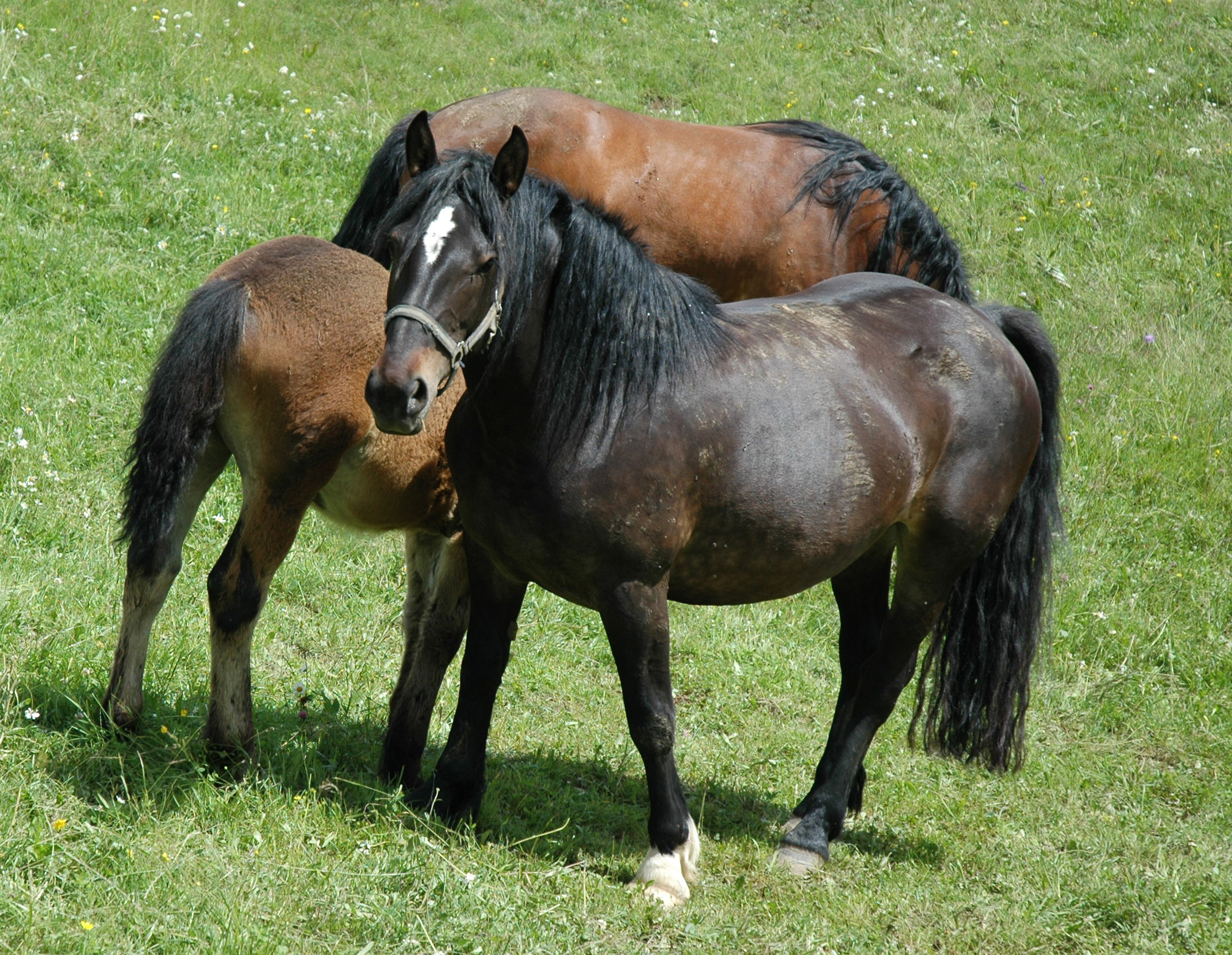 V Babnem Polju se v zadnjem času ukvarjajo s konjerejo